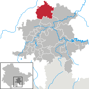 Remda-Teichel in Thuringia - District Saalfeld-Rudolstadt